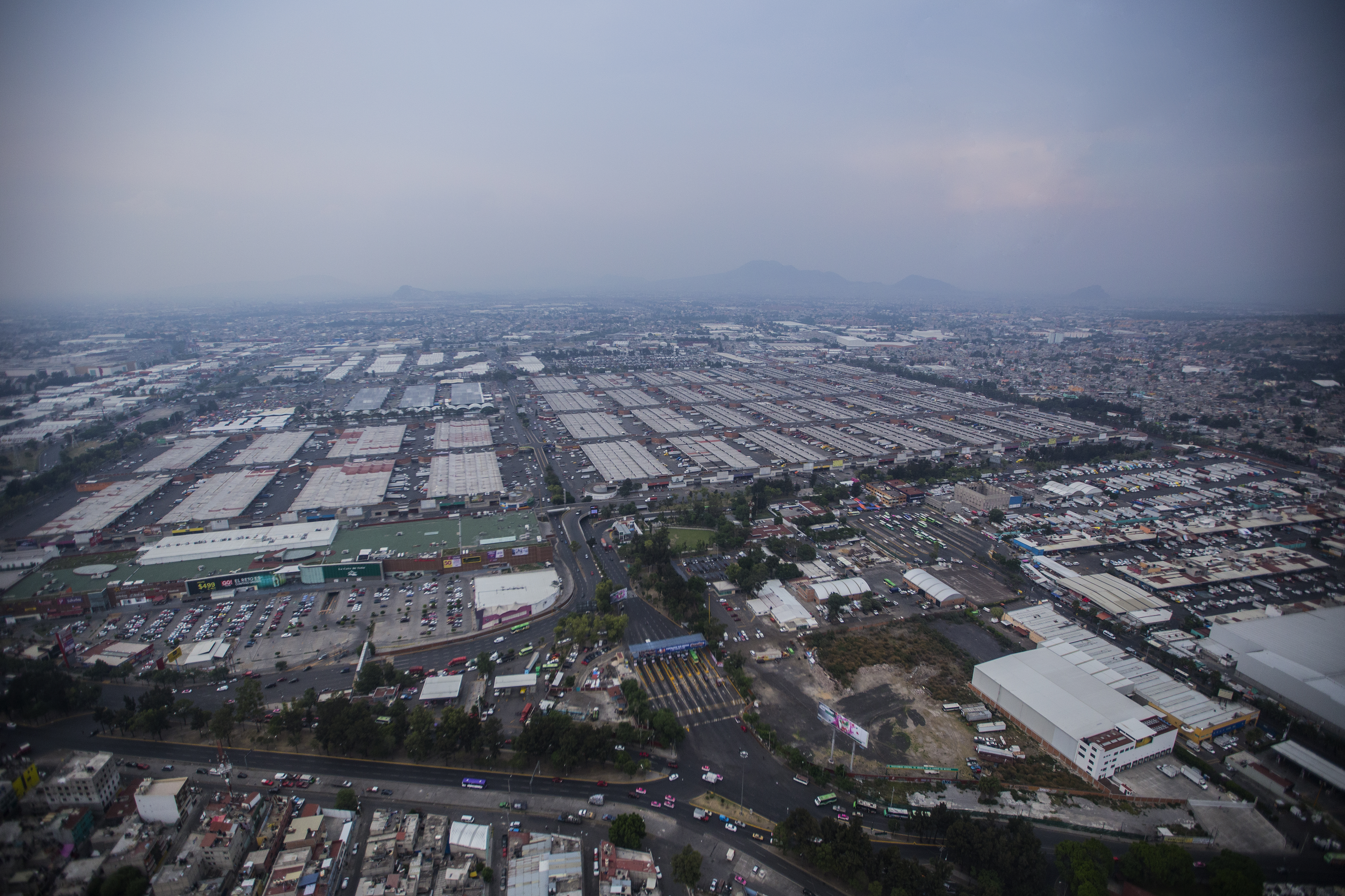 Fotografías de la Ciudad de México desde el aire.